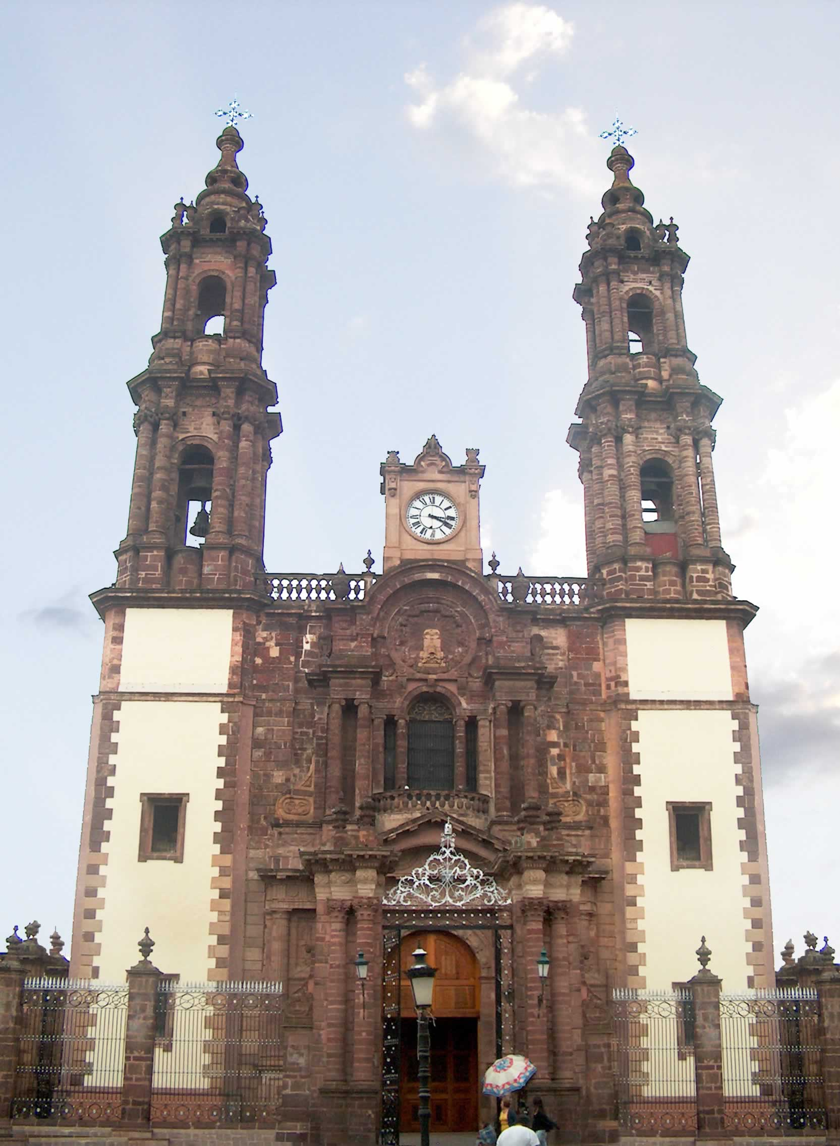 Foto de la catedral de Zamora de Hidalgo, Michoacán